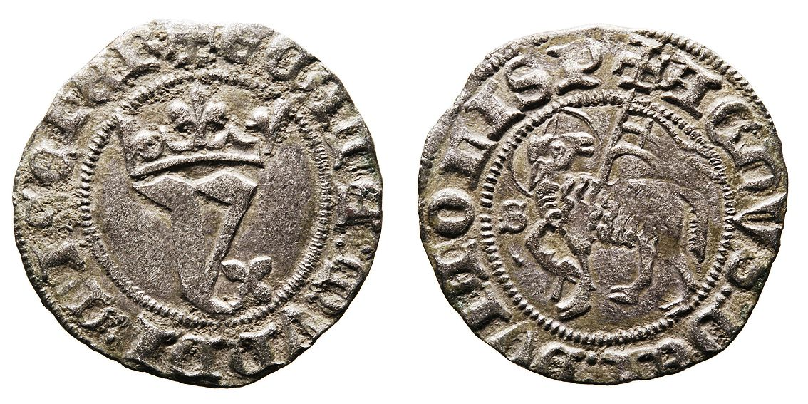 Blanca del Agnus Dei emessa al regnat de Joan I. Seca de Sevilla (S davant del xai).